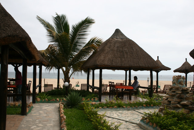 Ilha do Cabo (Luanda Island), Angola